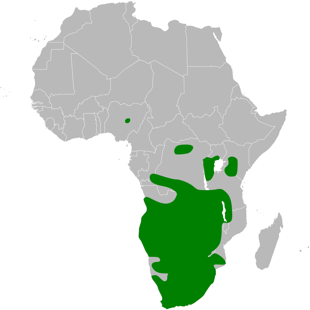 Calandrella cinerea distribution map, based on